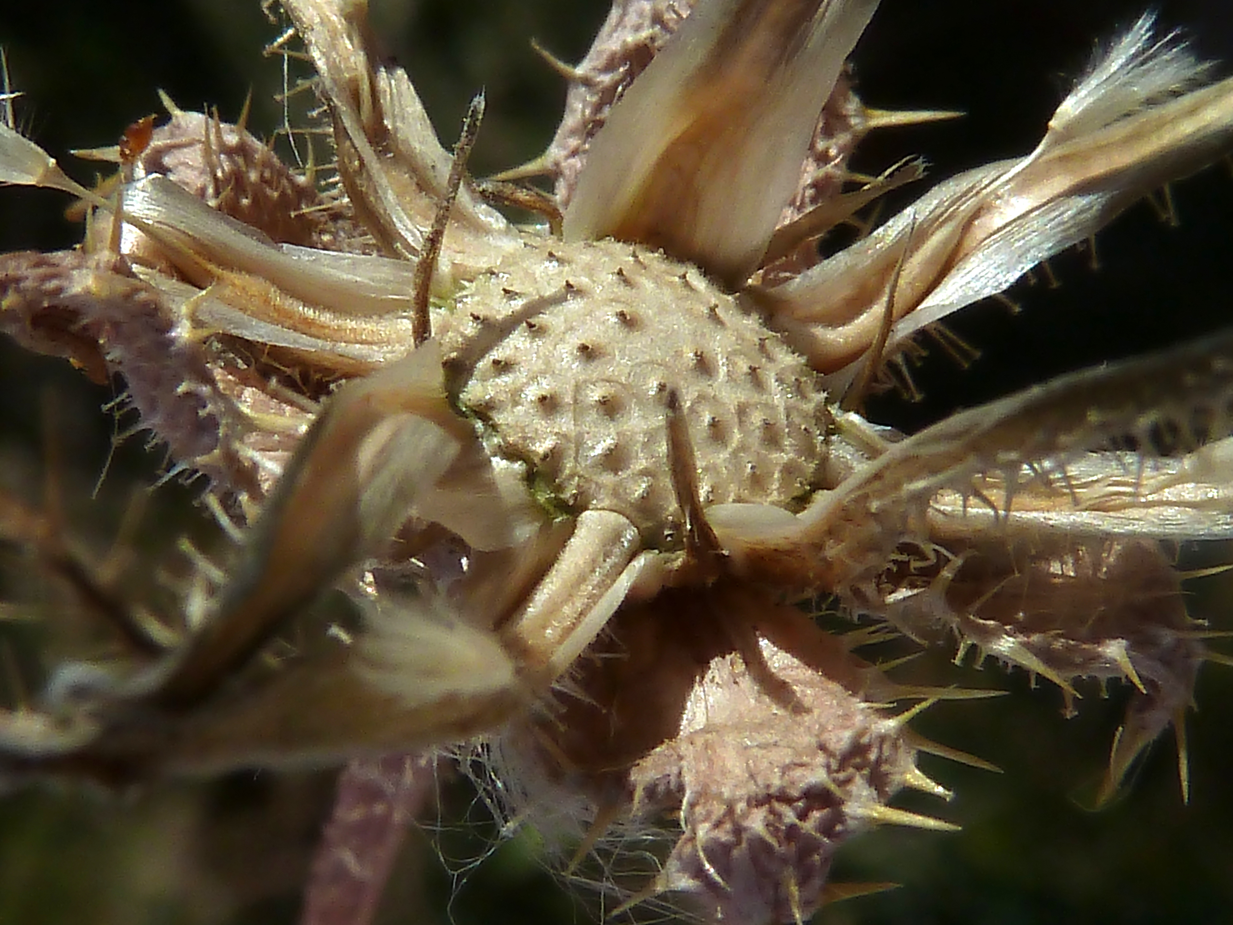 Helminthotheca echioides (raspasayo) - Receptáculo; aun están in situ las cipselas periféricas. - La Huerta, circa Biblioteca, Albatera, Provincia de Alicante, España).